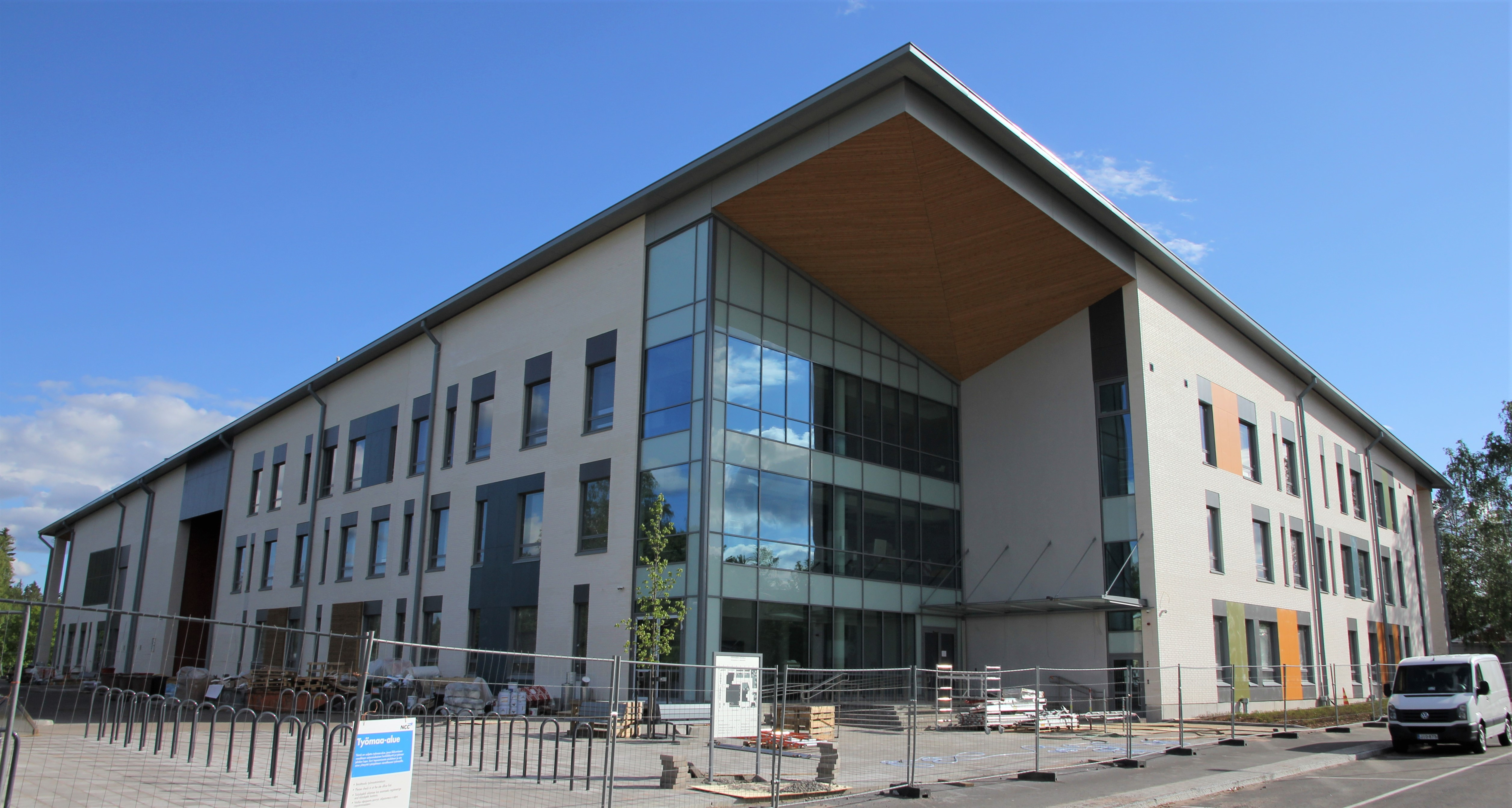 Rakenteilla oleva Kinnarin koulun uudisrakennus kesäkuun 2019 alussa. Koulun osoite Koulukuja 3, joka on Järvenpään Kinnarin kaupunginosassa. Koulukäyttöön rakennus otettiin elokuussa 2019.